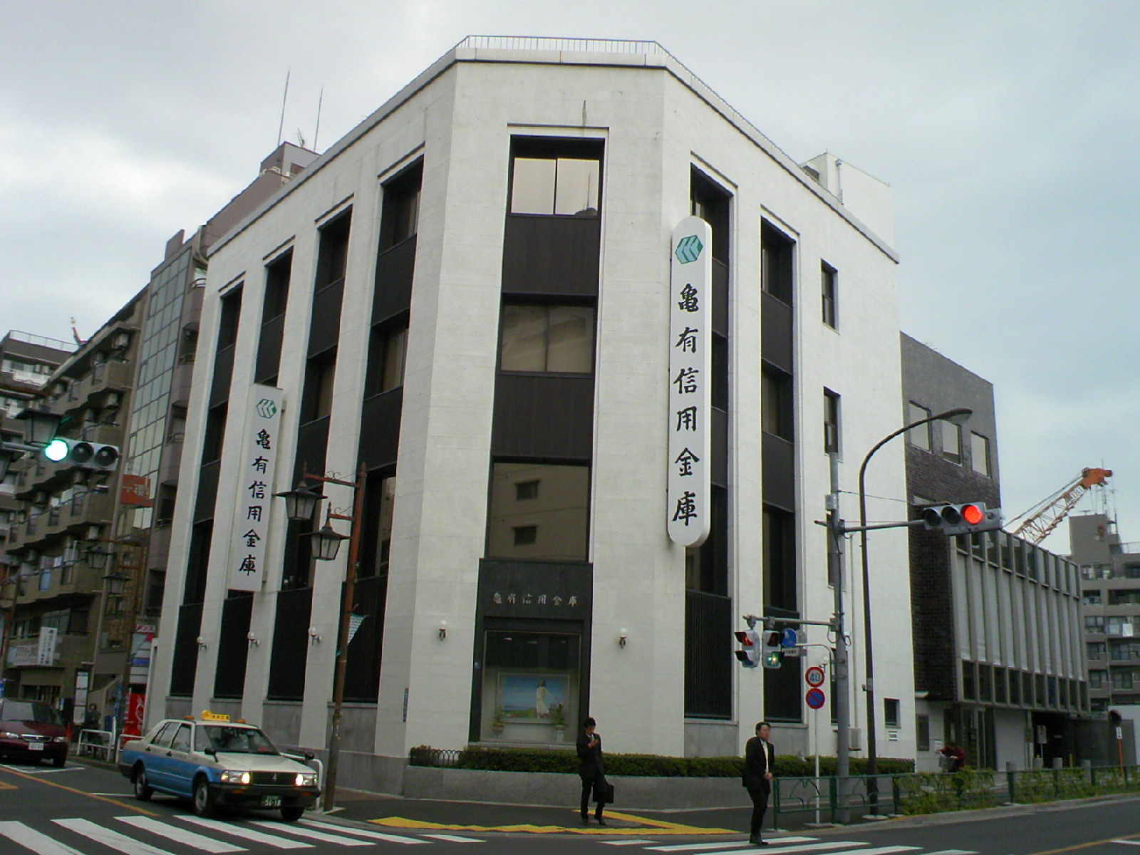 亀有信用金庫 本店営業部